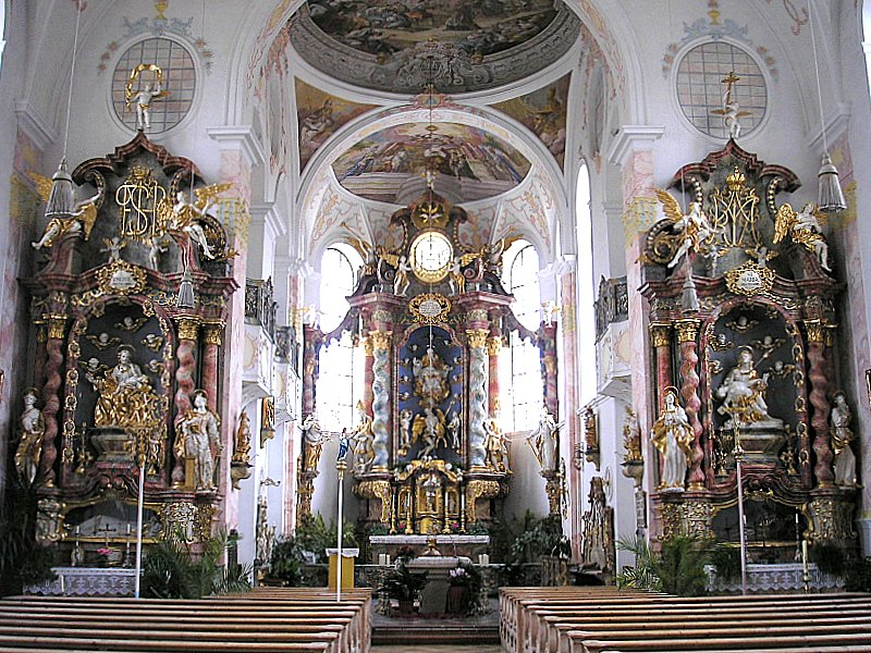 Pfarrkirche St. Nikolaus (Bernbeuren, Landkreis Weilheim-Schongau, Oberbayern). Innenansicht nach Osten. Eigene Aufnahme, Feb. 2007 / Parish church St. Nikolaus (Bernbeuren, Upper Bavaria, Germany). Interior, looking east. Own photo, Feb. 2007